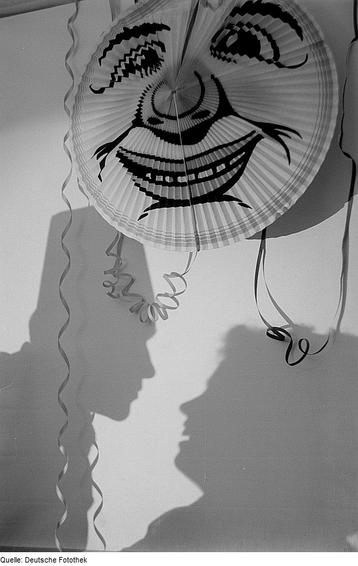 Original image description from the Deutsche Fotothek Bild Ein Lampion mit Mondgesicht sowie der Schatten eines kostümierten Paars